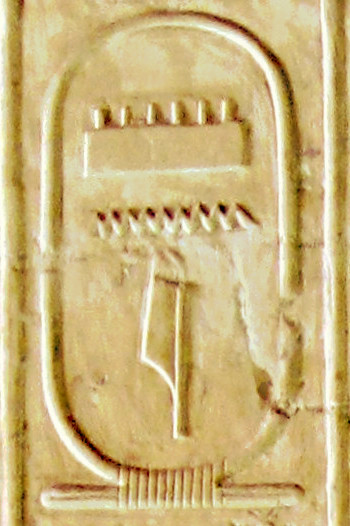 Mni. Königsliste im Totentempel Sethos I. in Abydos, Ägypten